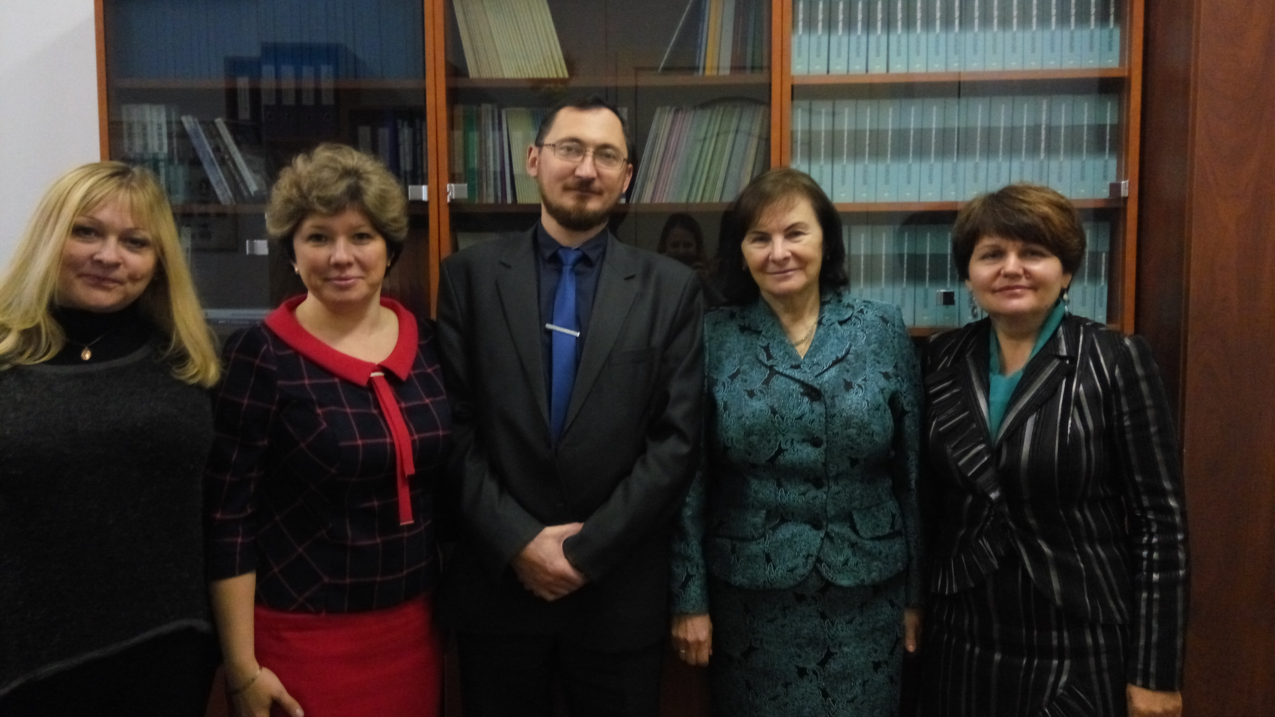 Члени наукової школи з проблем творчості і технологій у неперервній професійній освіті С.О. Сисоєвої на засіданні Української Академії Акмеологічних Наук в Київському університеті імені Бориса Грінченка (2017)